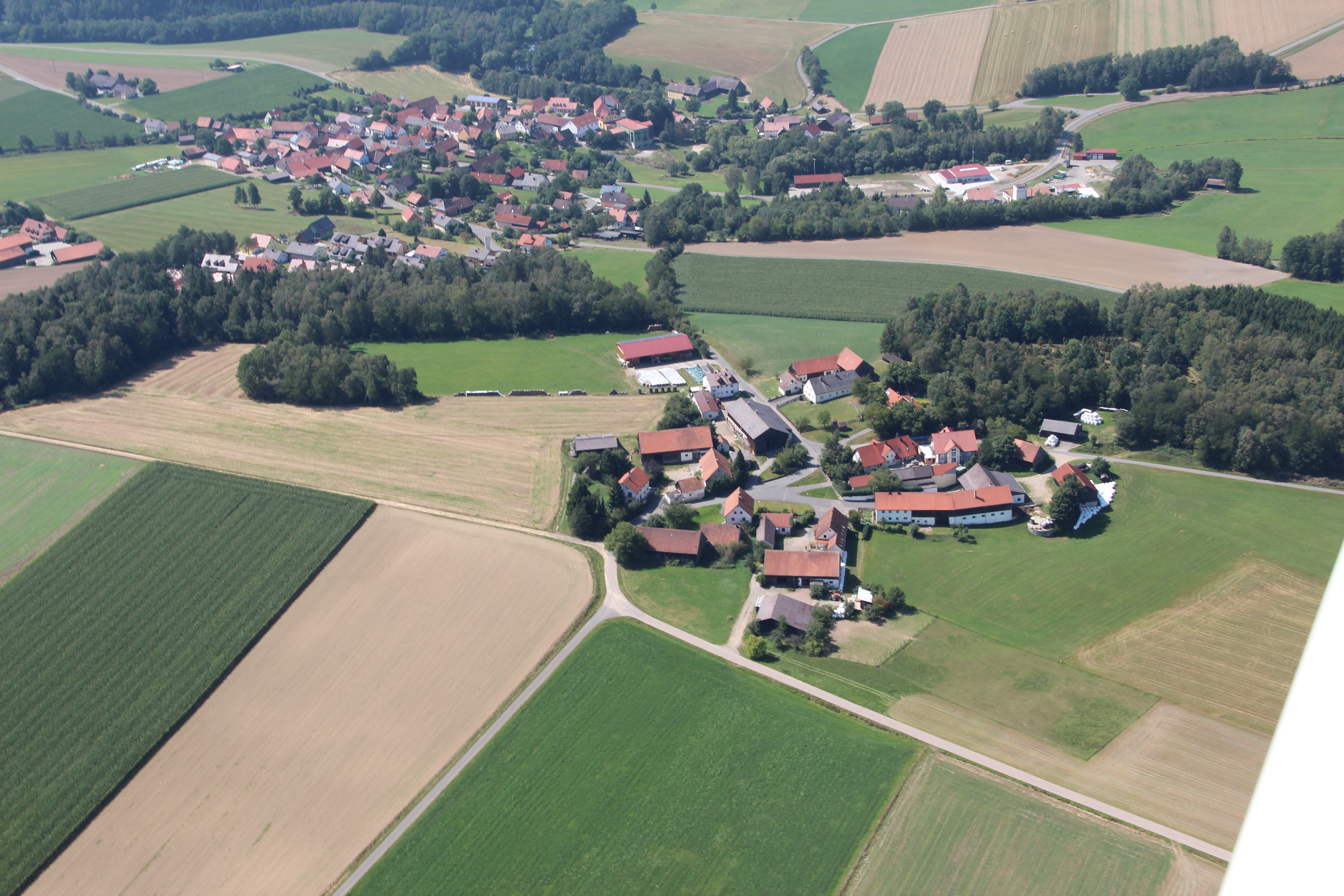 Burkhardsberg, am oberen Bildrand Fuchsberg (Gemeinde Teunz)